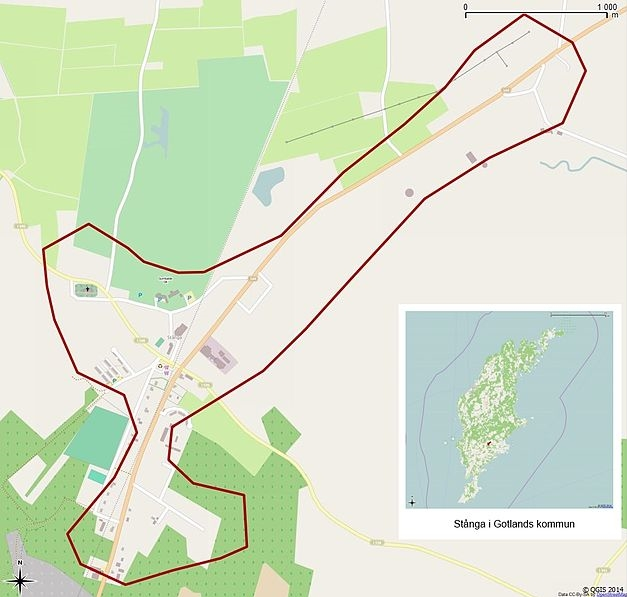 Tätorten Stångas gränser 1990 enligt Atlas över rikets indelningar 1992.